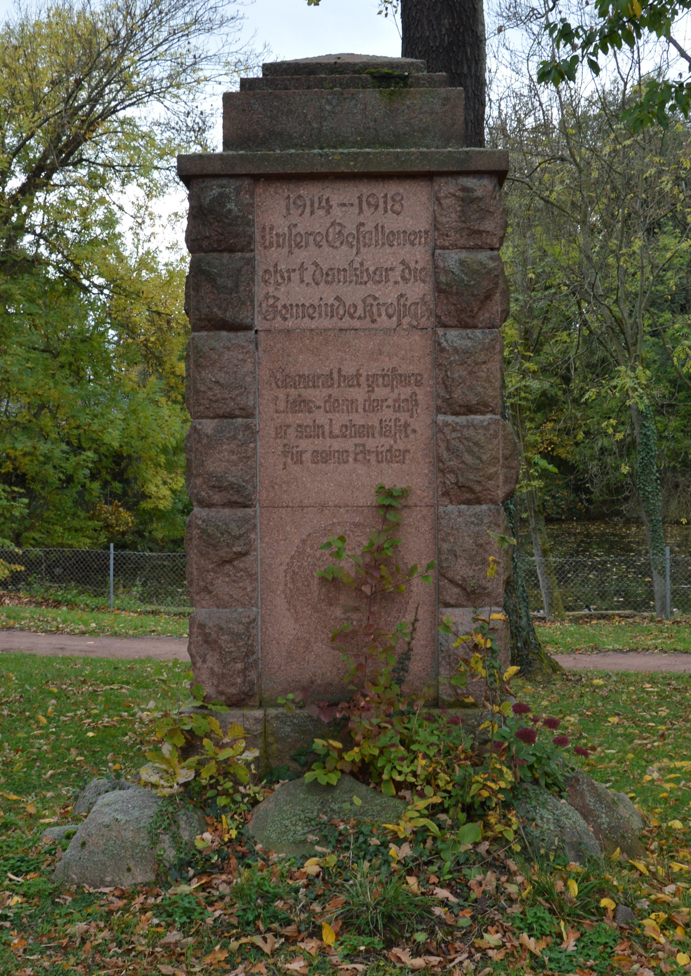 Kriegerdenkmal Kaltenmark